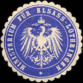 Sealing stamp Title: Ministerium für Elsass - Lothringen Description: blau, weiß, geprägt Place: size: 4 cm